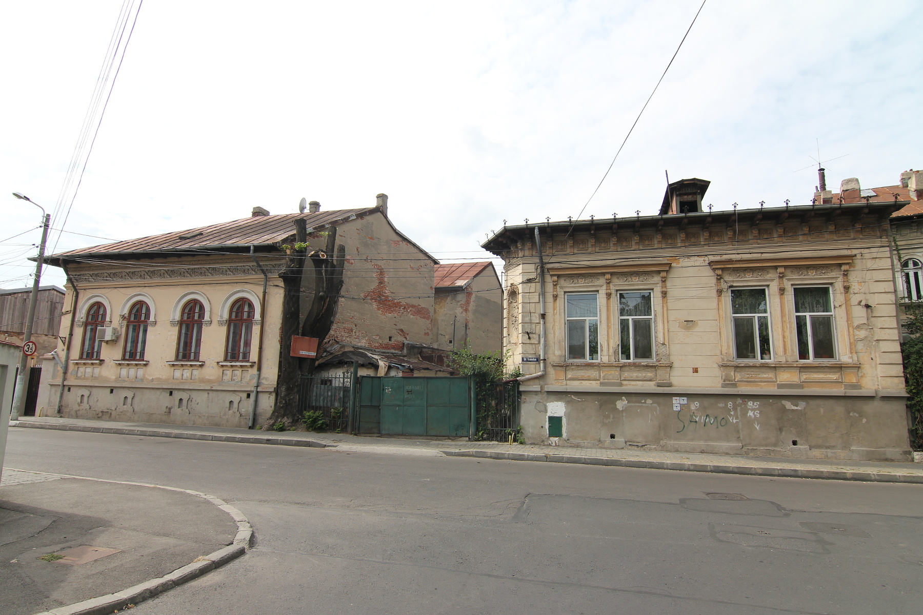 Casă pe Str Romulus